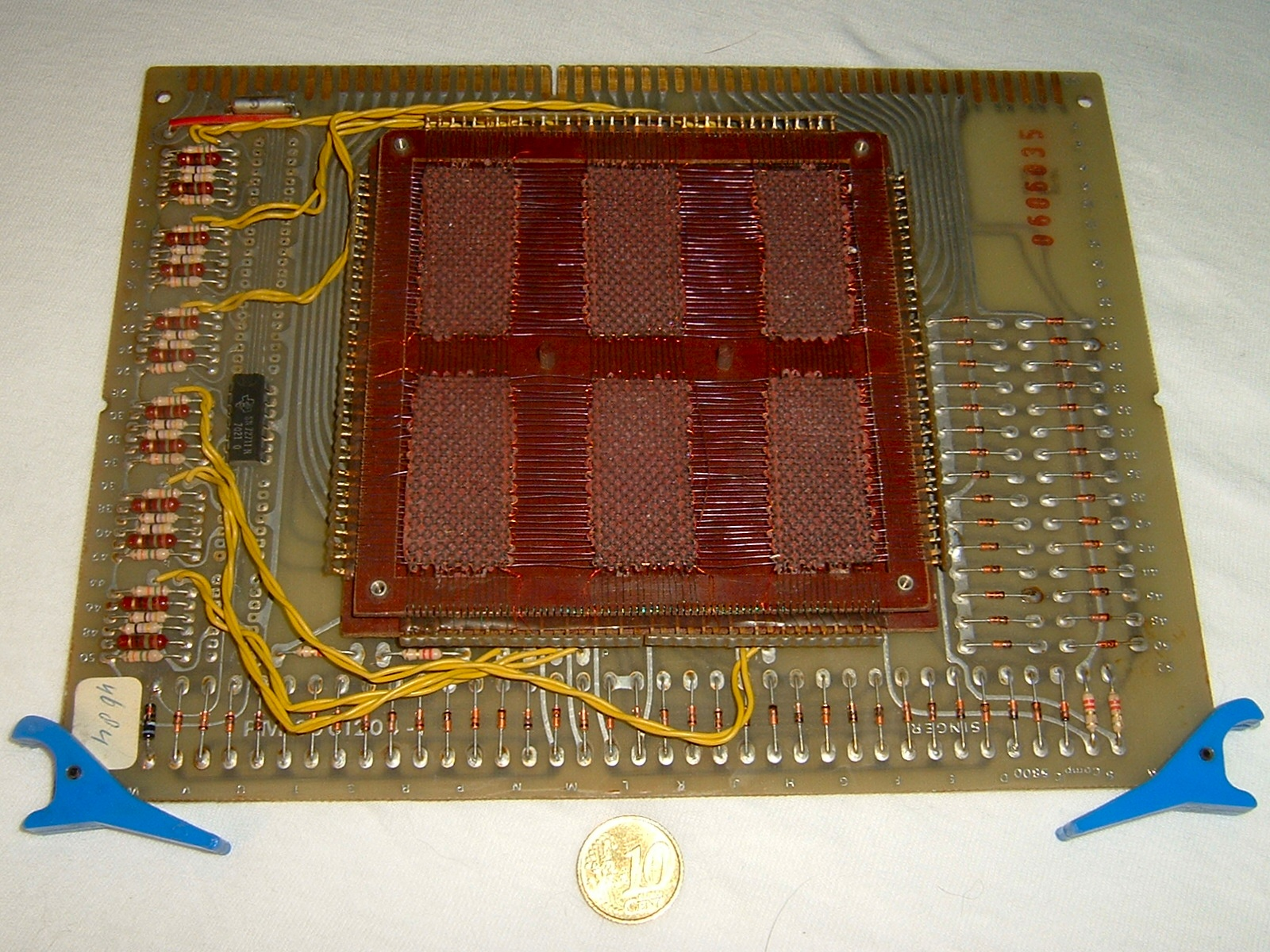 Ringkerngeheugen (van de rommelzolder van Quistnix) - foto gemaakt 14 sept. 2004 - Gemaakt voor: Afbeelding:Encyclopedie afbeelding.png